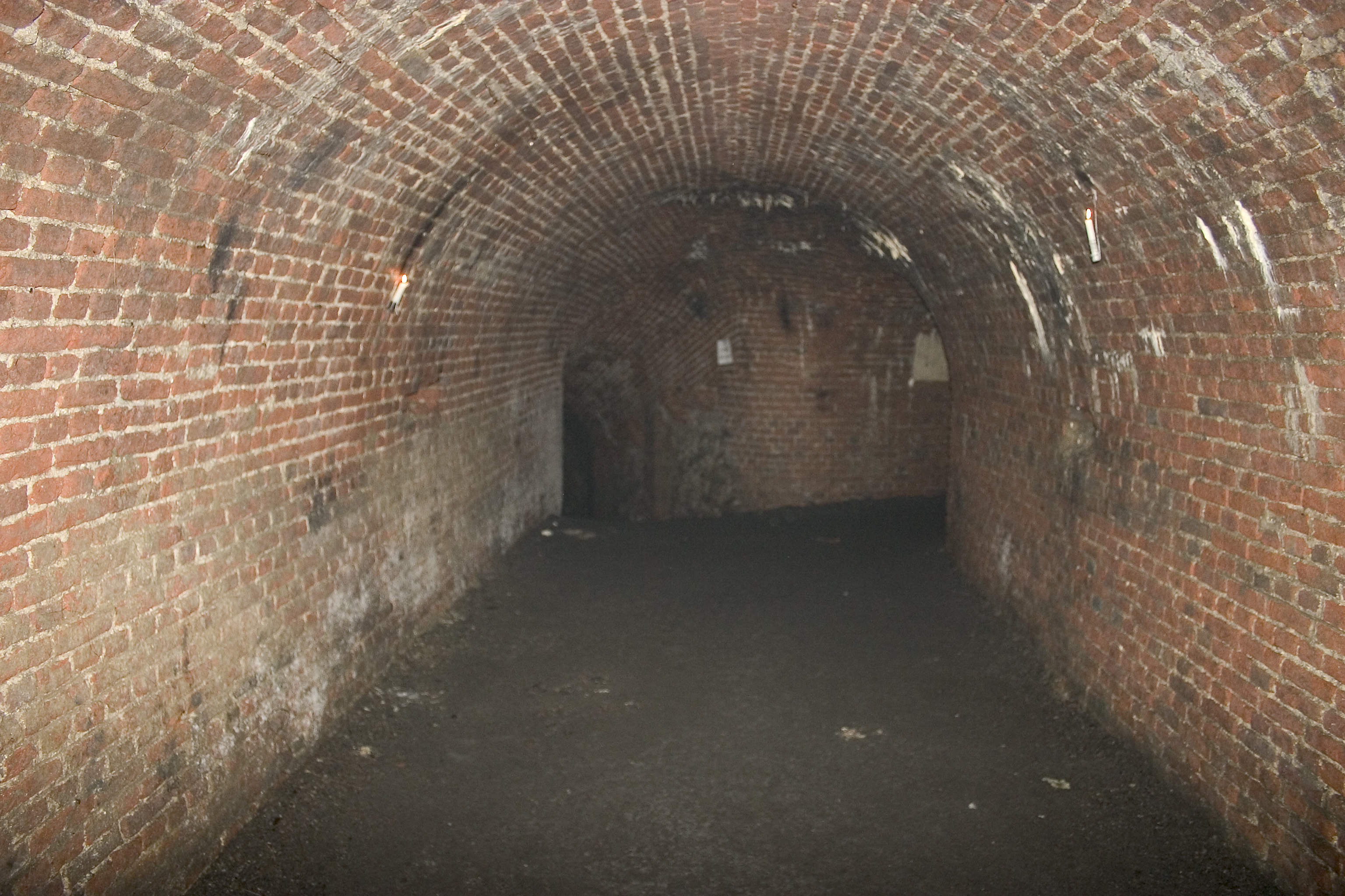 Bapaume galerie de mine du bastion de la Reyne